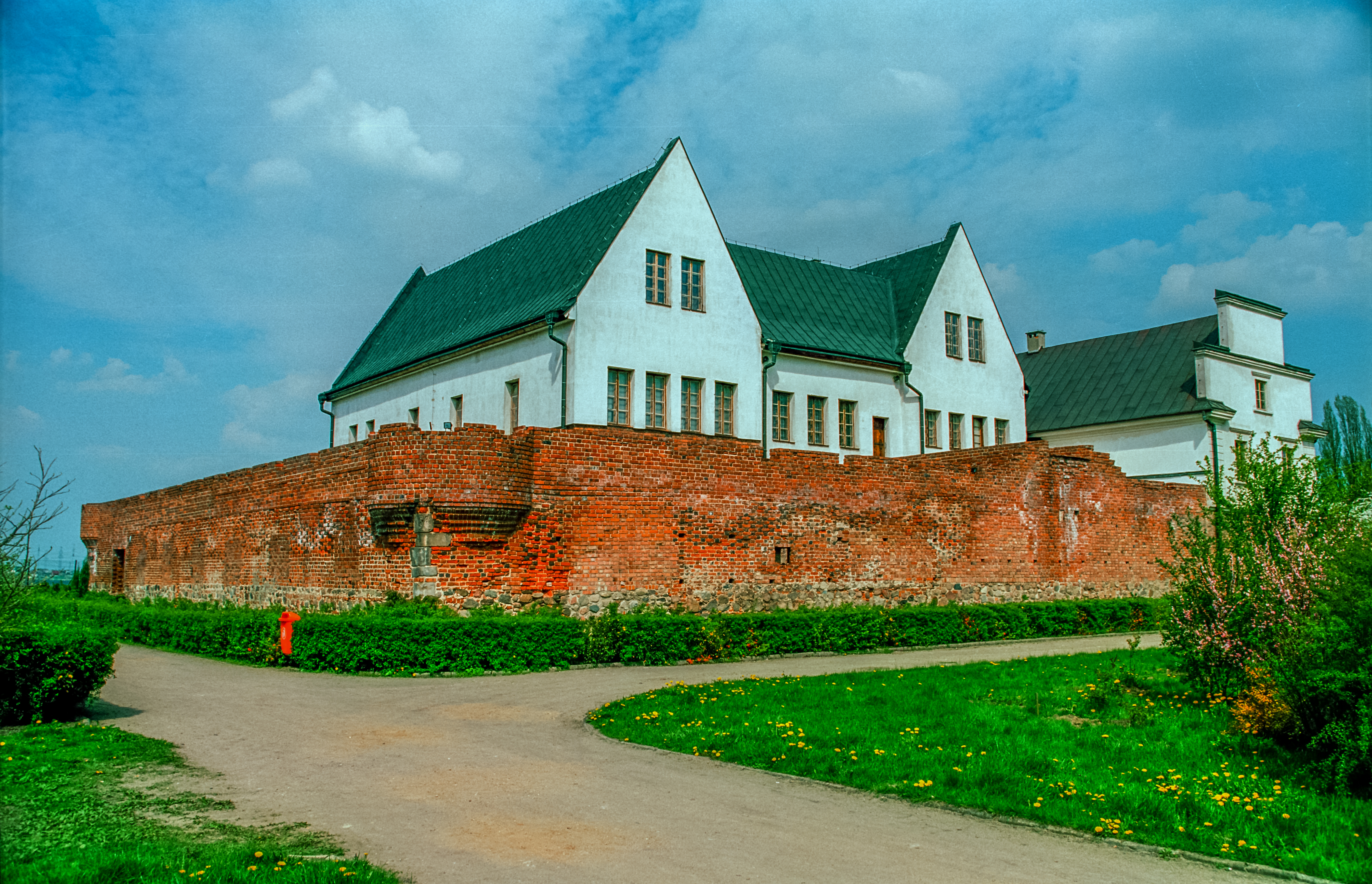 Gosławice, mury zamkowe